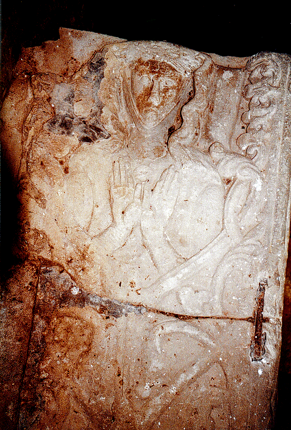 Arch Siwan. Biwmares.